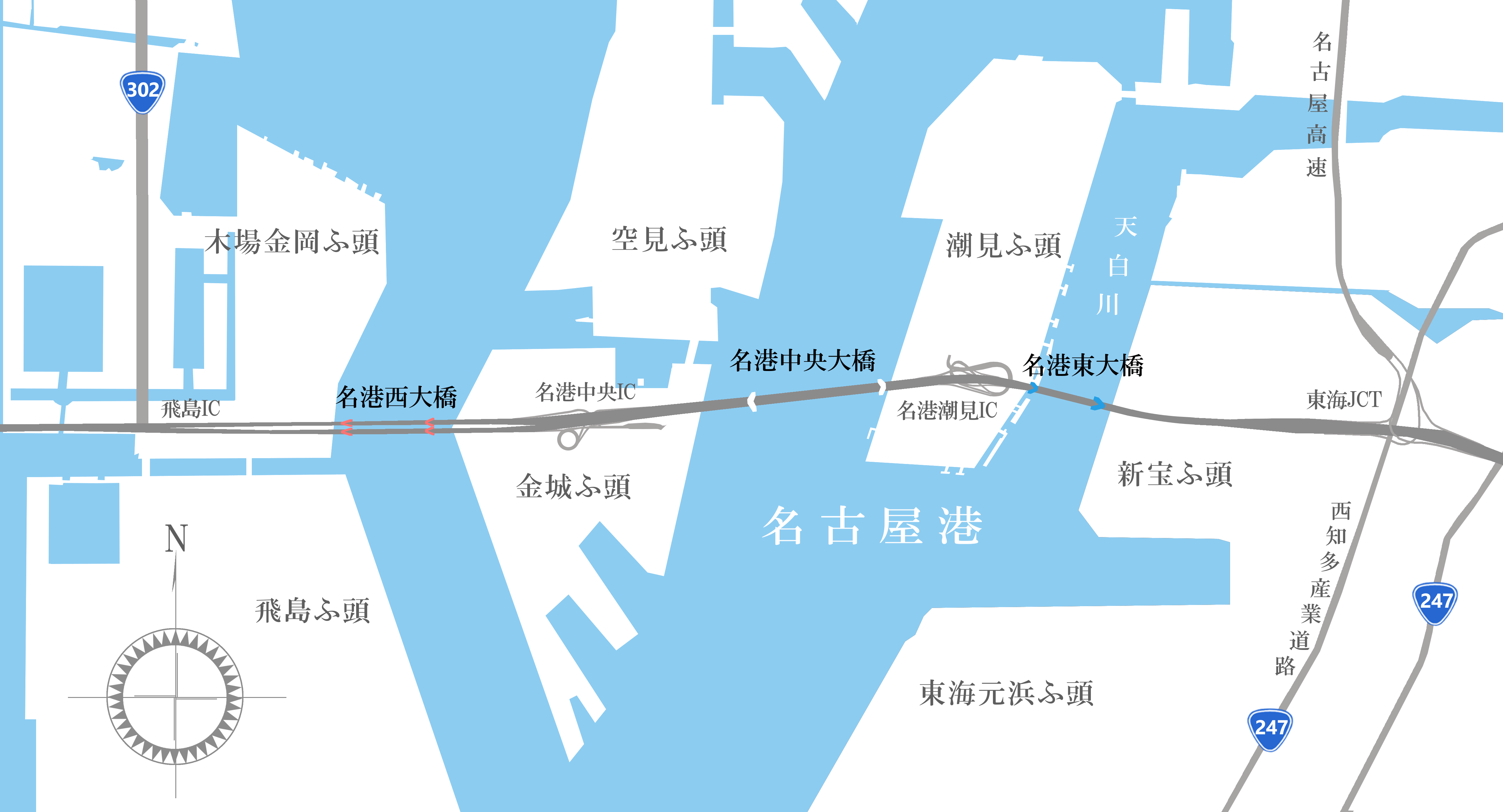 名港トリトン配置図